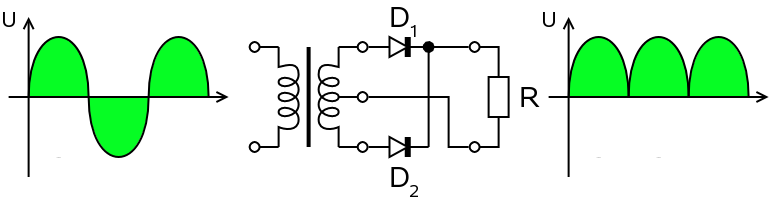 RECTIFICADOR DE ONDA COMPLETA CON DERIVACIÓN CENTRAL EN EL TRANSFORMADOR Tipo transformador con derivación central:Debido a la conexión en el centro del devanado secundario, el circuito es equivalente a dos rectificadores de media onda. El rectificador superior funciona con el semiciclo positivo de la tensión en el secundario, mientras que el rectificador inferior funciona con el semiciclo negativo de tensión en el secundario. Es decir, D1 conduce durante el semiciclo positivo y D2 conduce durante el semiciclo negativo. Así pues la corriente en la carga rectificada circula durante los dos semiciclos. En este circuito la tensión de carga VL, como en el caso anterior, se medirá en la resistencia RL.